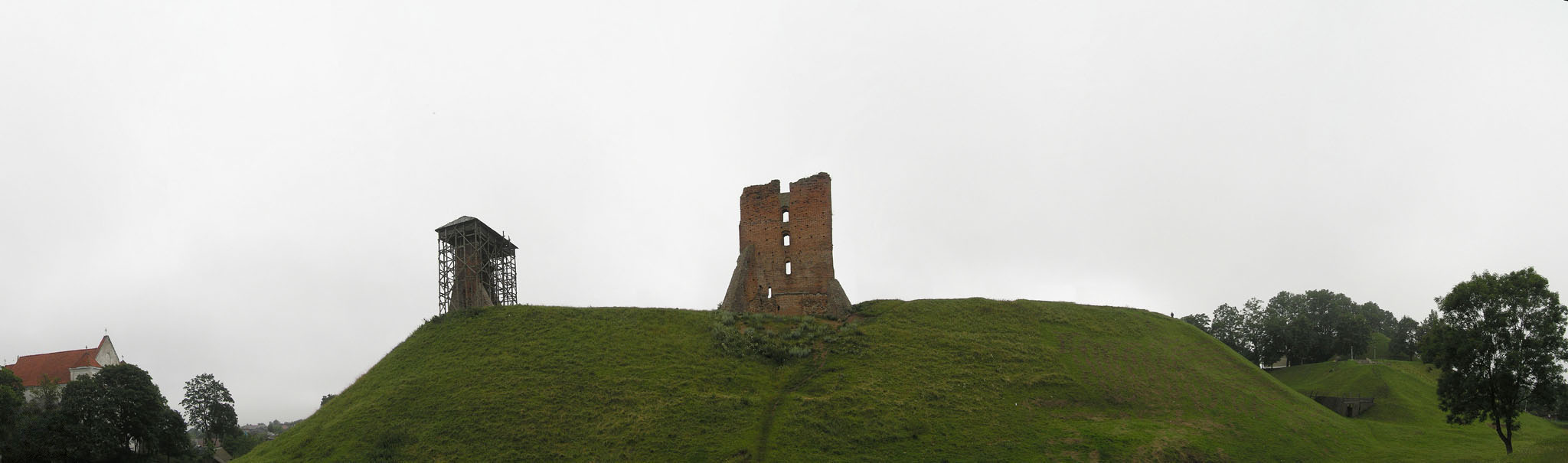 Беларуская (тарашкевіца): Наваградак